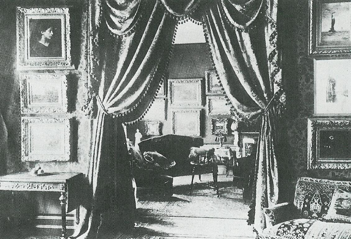 Die Innenräume der Haager Filiale der Kunstgalerie Goupil&Cie, wo Vincent van Gogh den Kunsthandel erlernte.